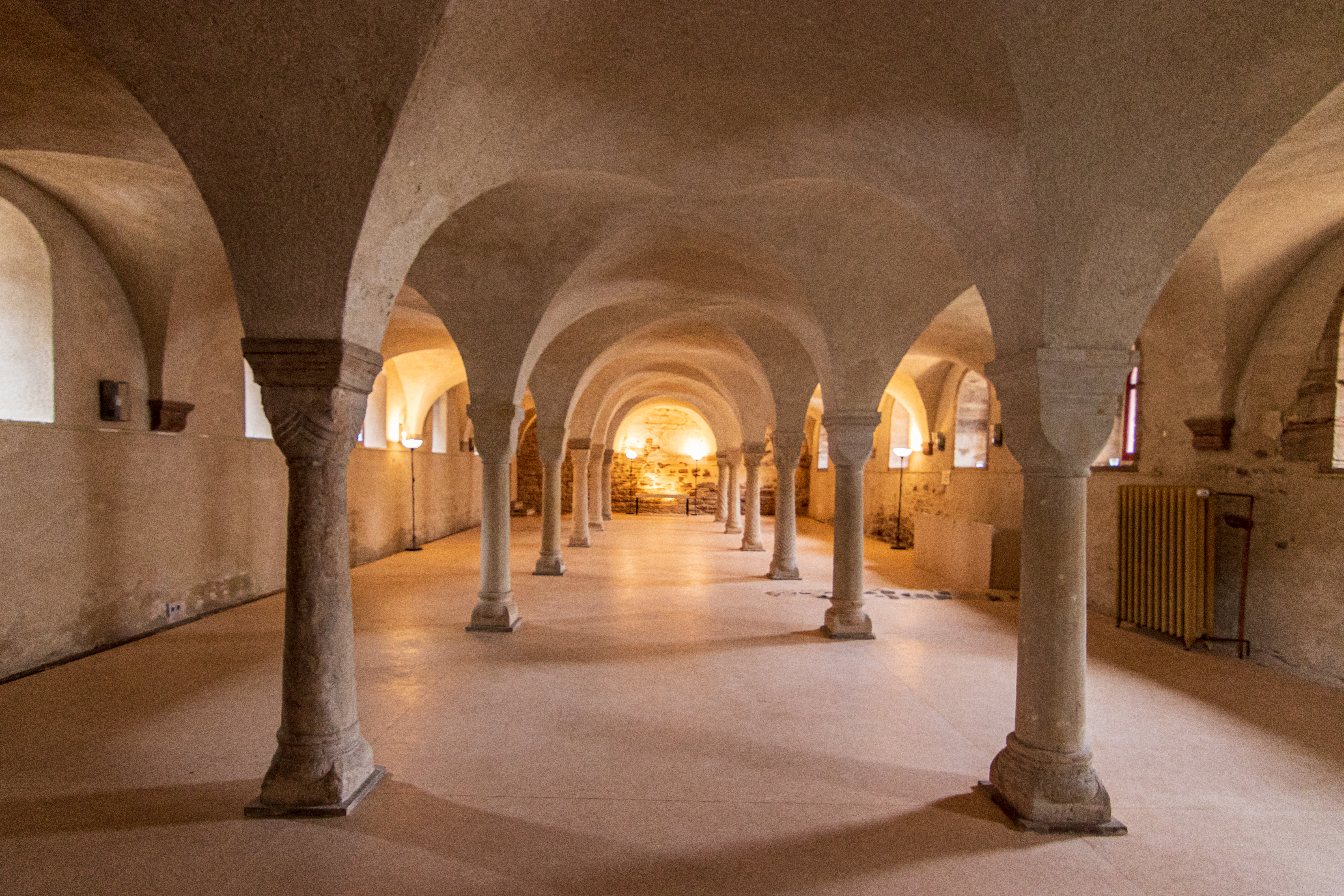 Kloster Ilsenburg – Blick ins Refektorium